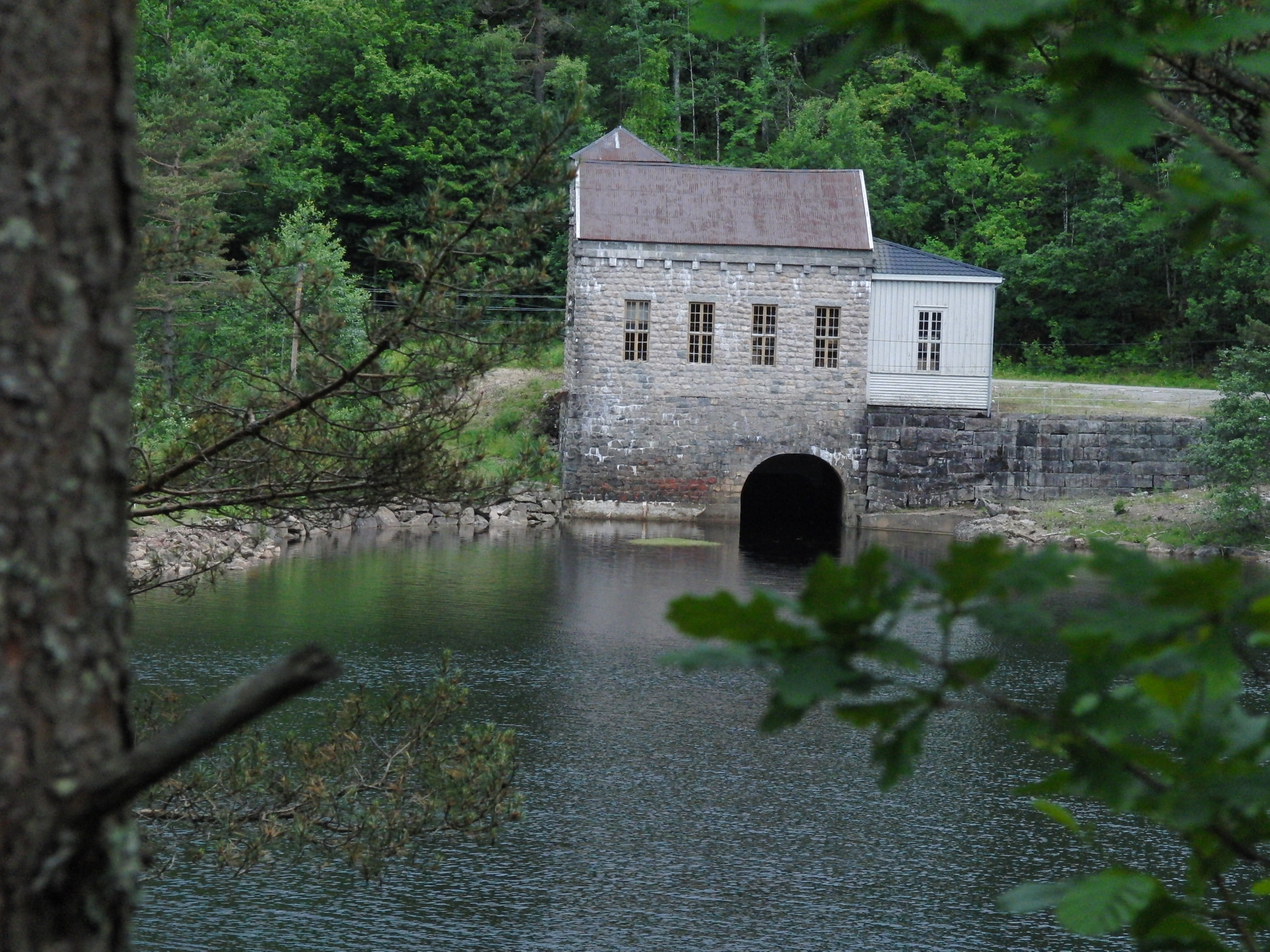 Gamle Bjelland kraftstasjon